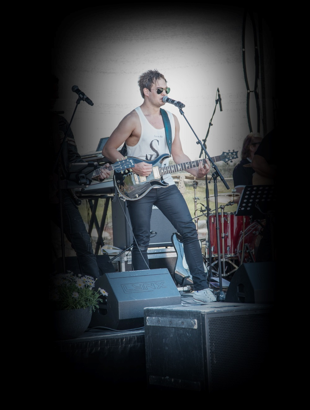 Rocking in the free world.